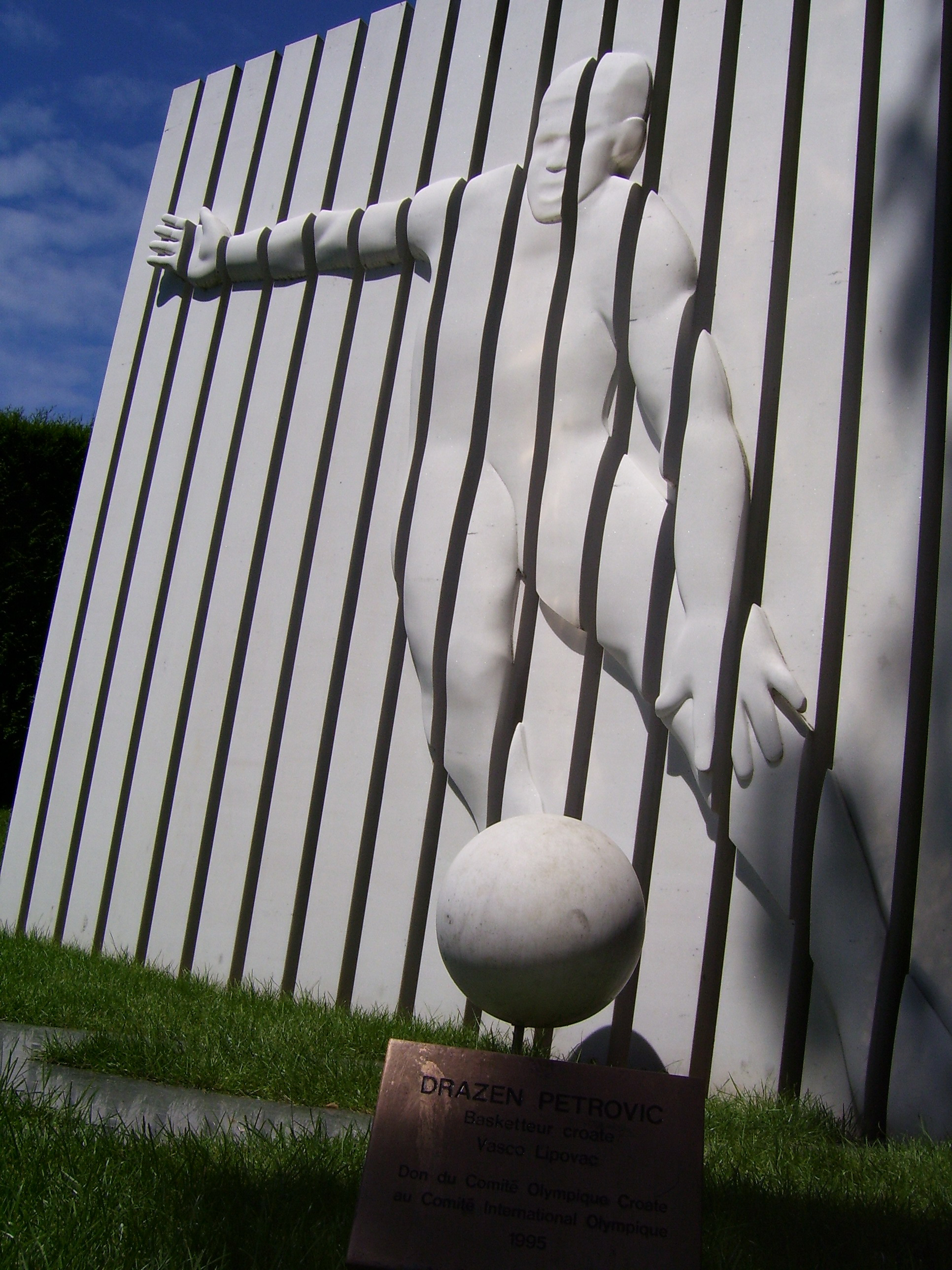 Spomenik Draženu Petroviću postavljen u parku Olimpijskog muzeja u Lausanni.